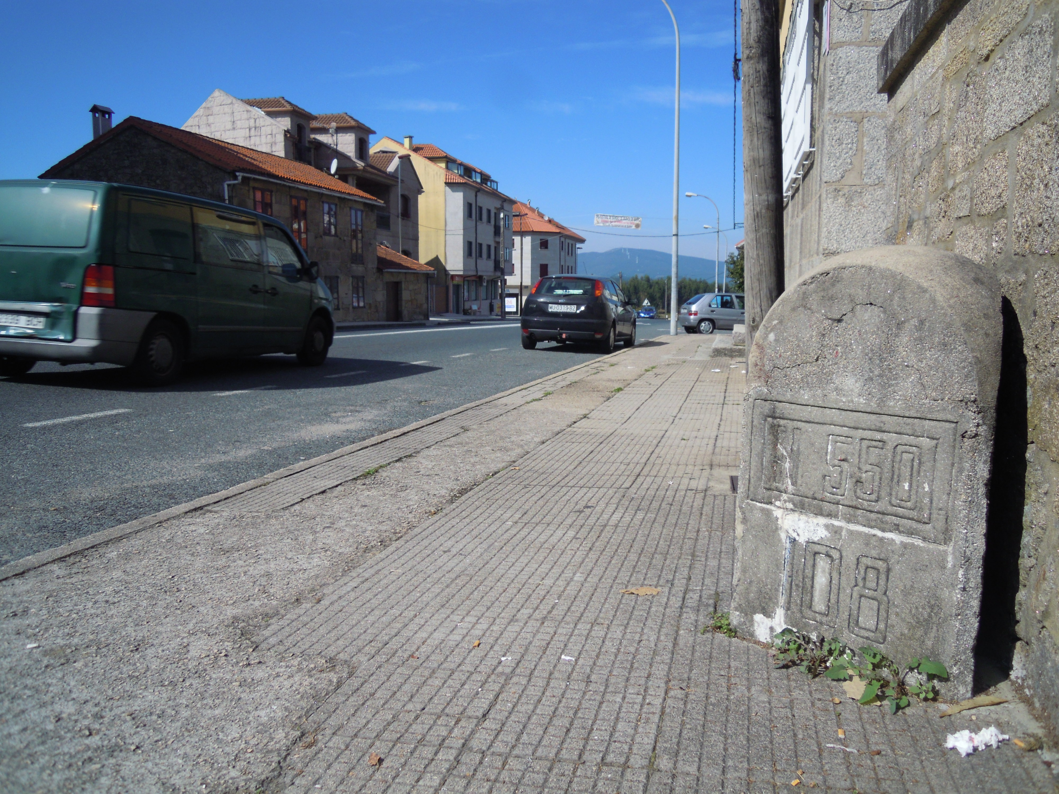 Fito na estrada N-550 ao seu paso pola aldea de Santo Antoniño (Perdecanai, Barro).